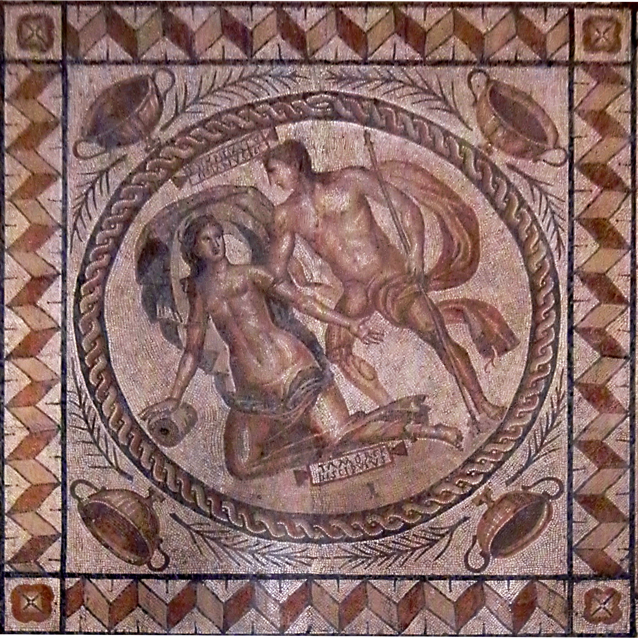 Mosaïque de Lillebonne - détail